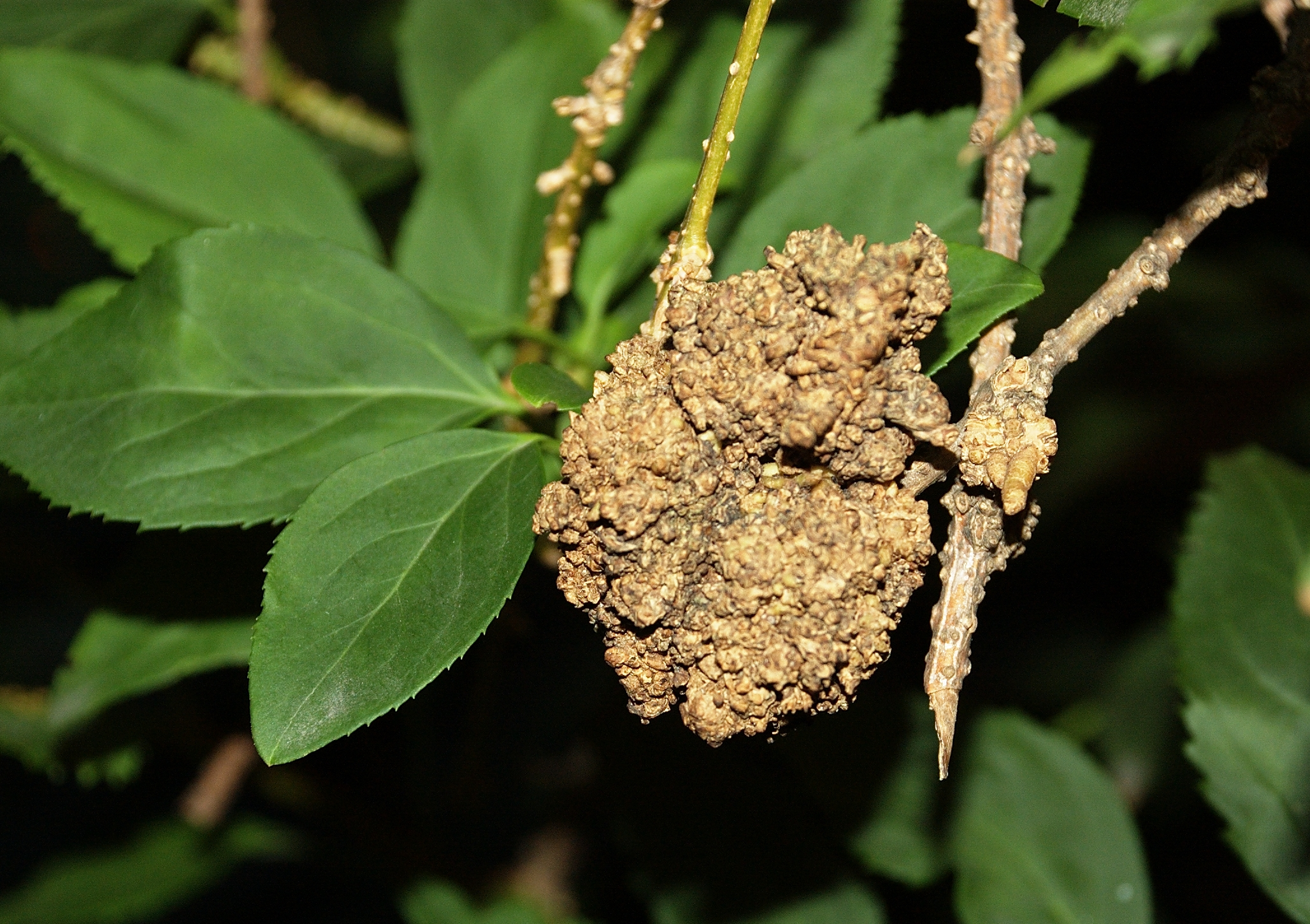 Durch Agrobacterium tumefaciens hervorgerufene Galle an einer Forsythie